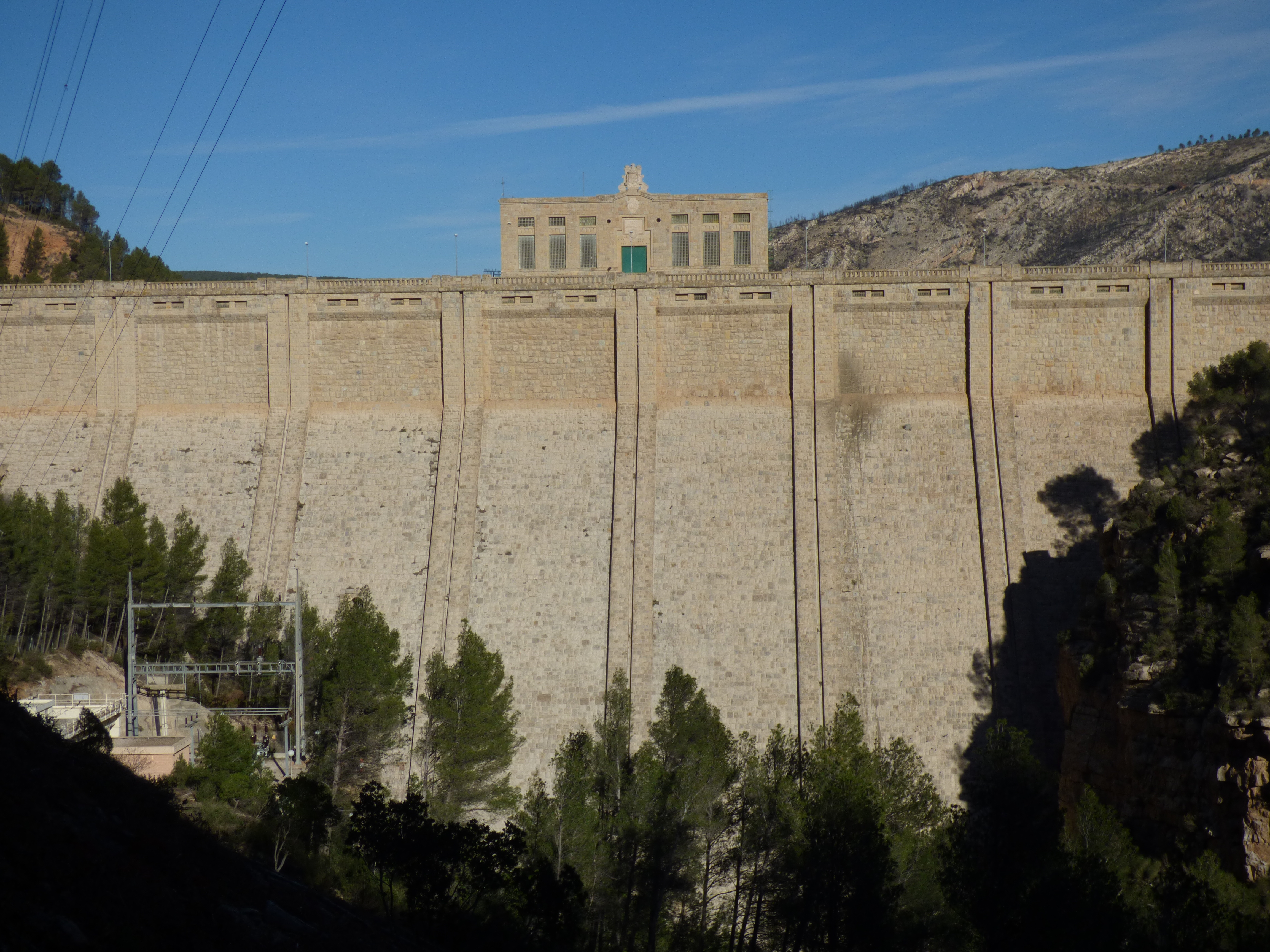 Presa de Benagéber desde aguas abajo